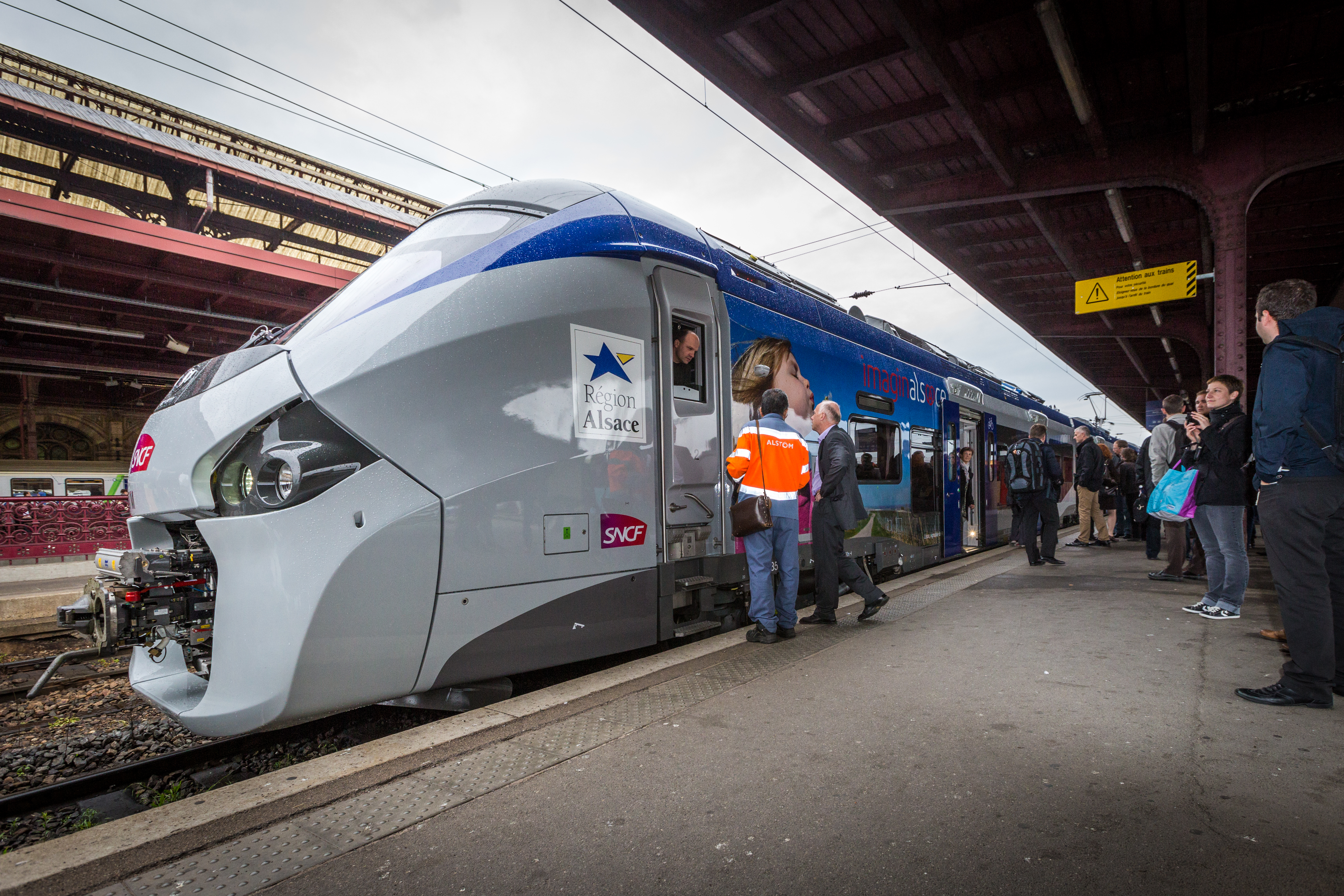 Le premier train Régiolis SNCF Région Alsace B83547M en service commercial dans la région Alsace, TER 830910 Strasbourg-Sarreguemines 28 avril 2014.